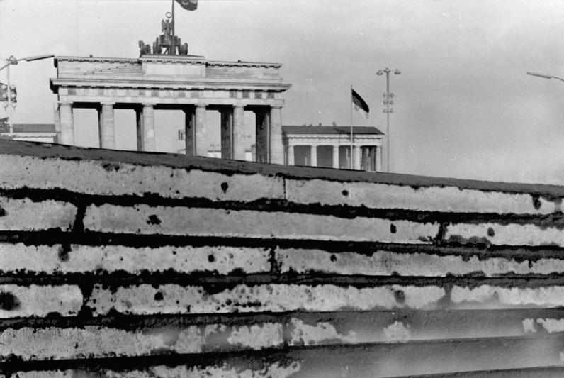 ADN-ZB/Sturm 20.11.1961 Berlin: Grenzsicherung am Brandenburger Tor.